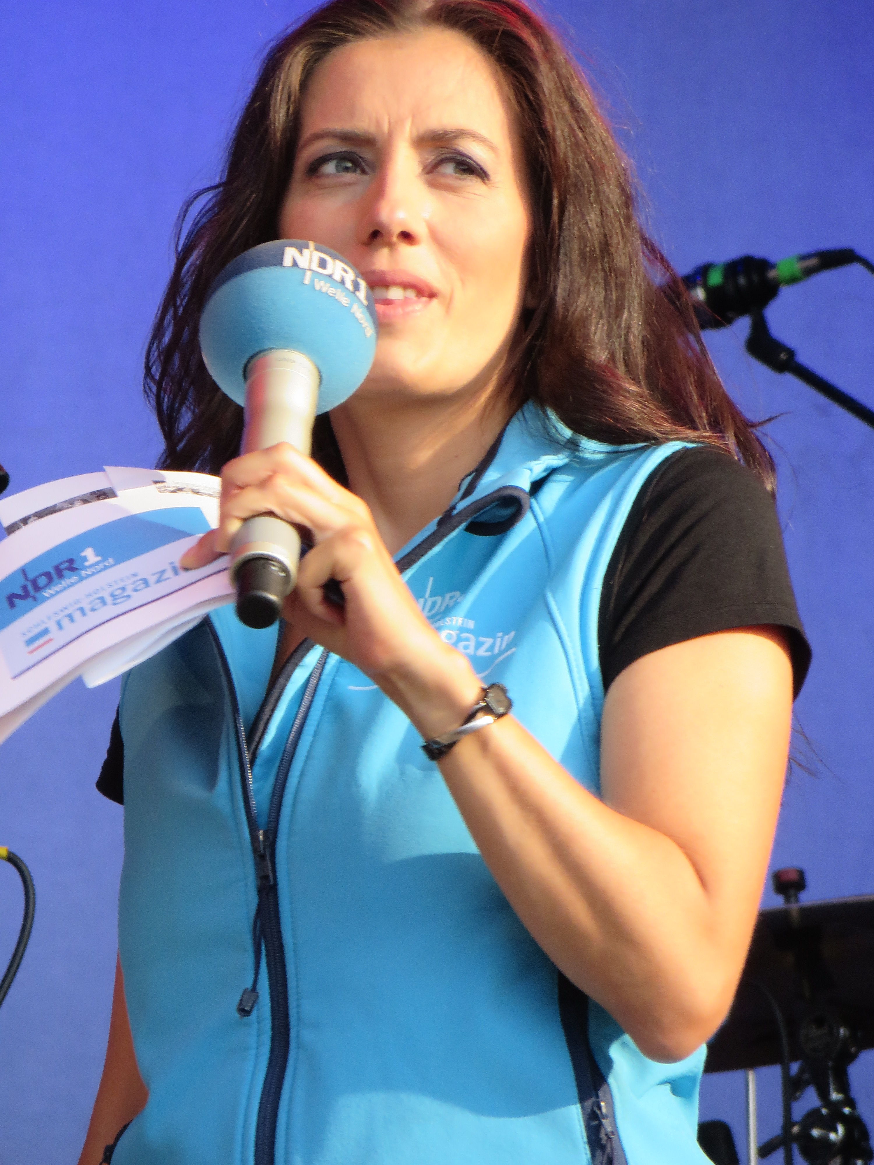 NDR Sommertour am Flensburger Hafen 2014, Vèrena Püschel, nach vorne, Bild 03